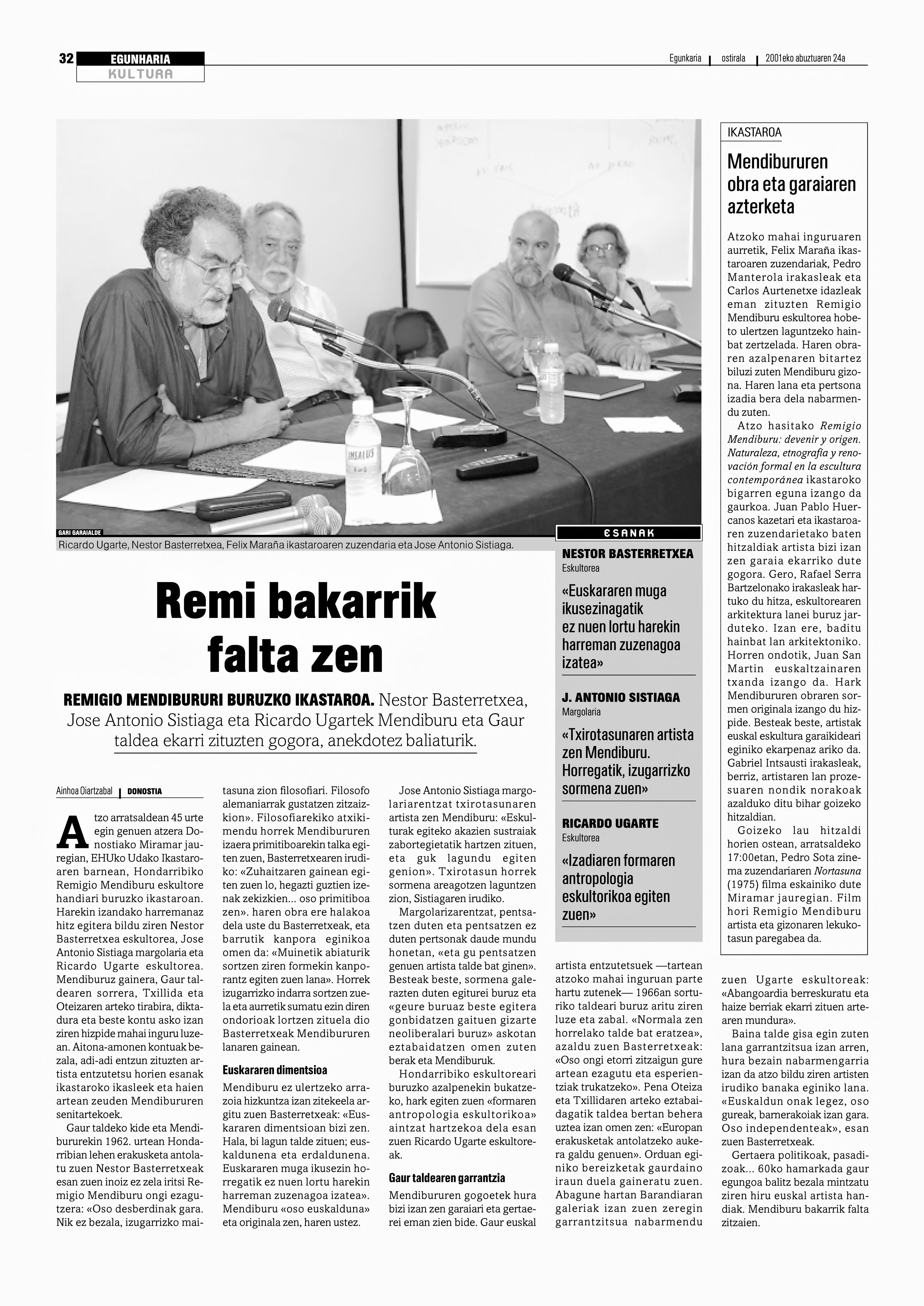 Remigio Mendiburuz mahaingurua. Albistea 2001an Euskaldunon Egunkarian.